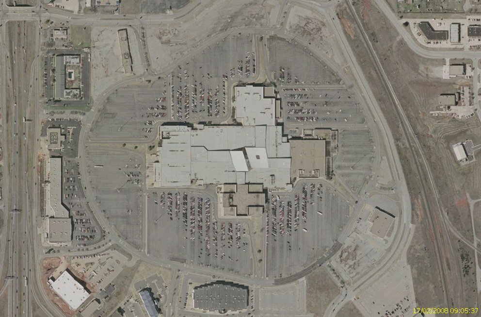 Image satellite du Crossroads Mall Image satellite USGS du logiciel NASA World Wind